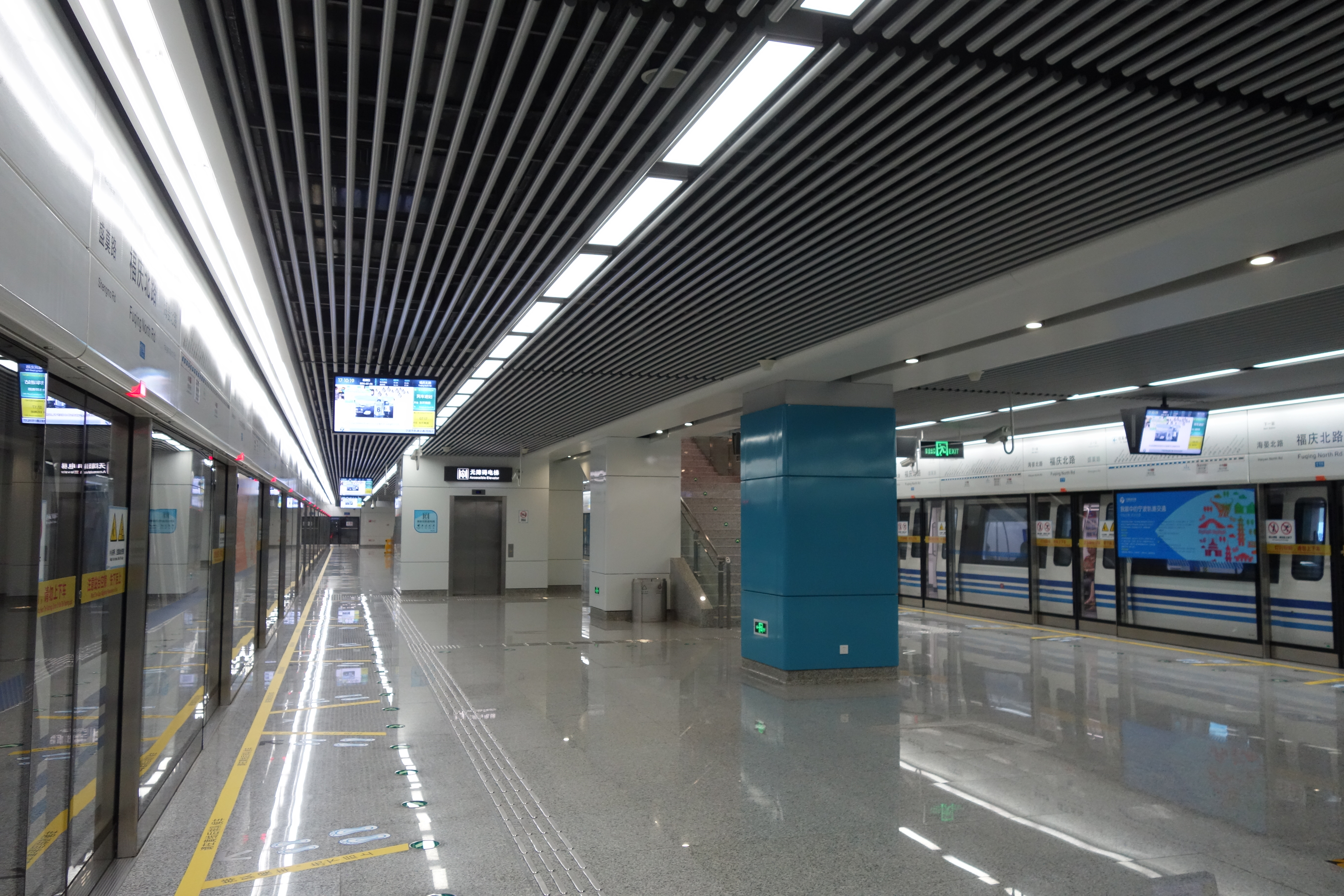 福庆北路站站台